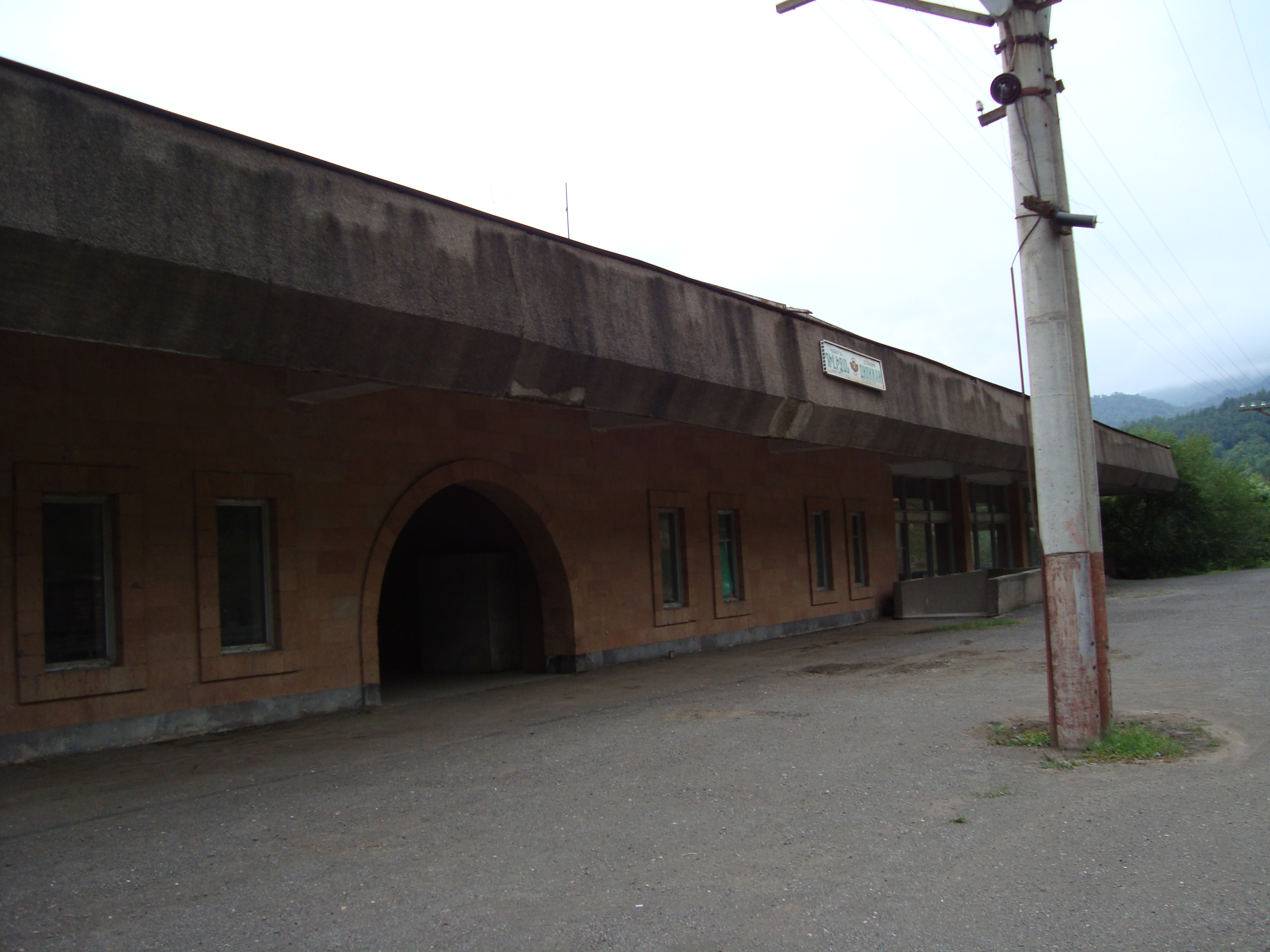 Railroad station in Dilijan, marz (province) Tavush, Republic of Armenia.